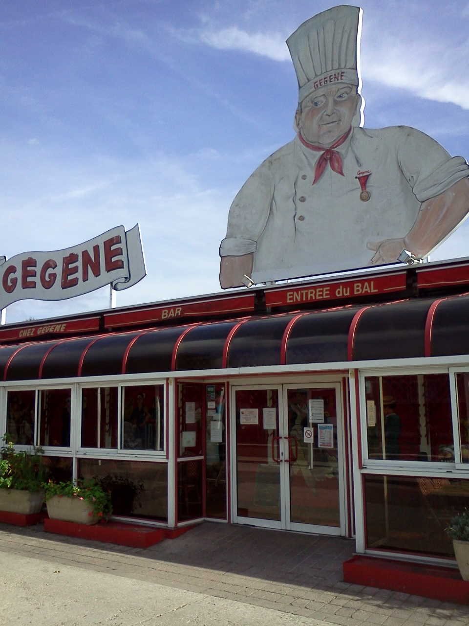 Restaurant Chez Gégène